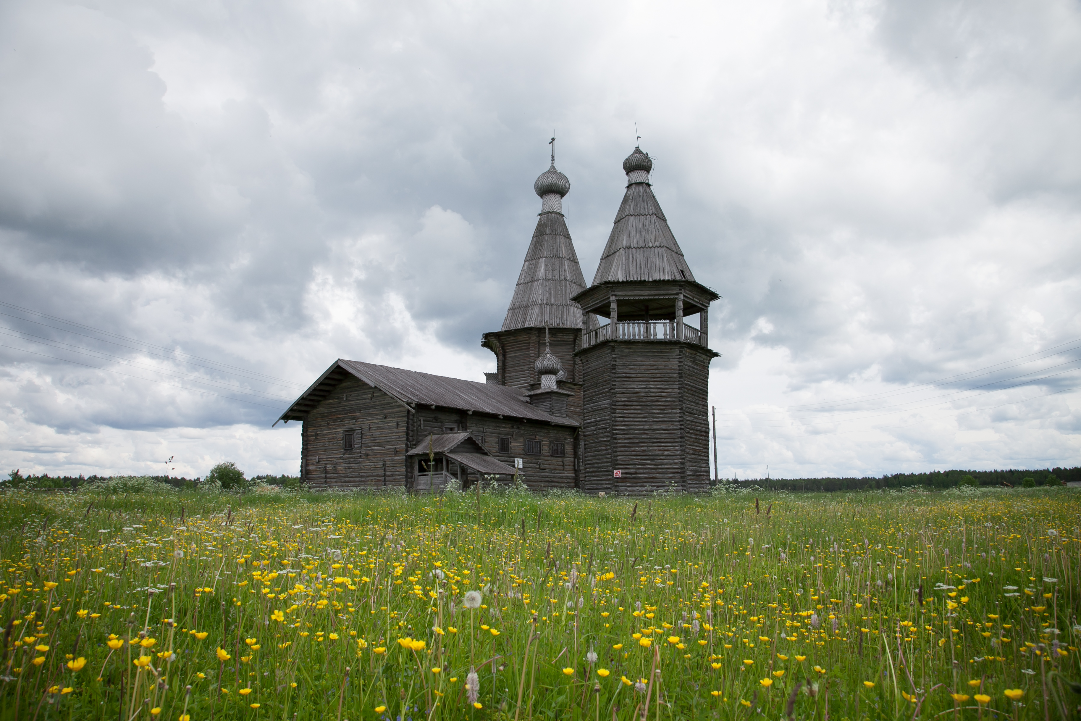 Церковь Иоанна Златоуста с колокольней (деревянная): Саунино, Каргопольский район, Архангельская область